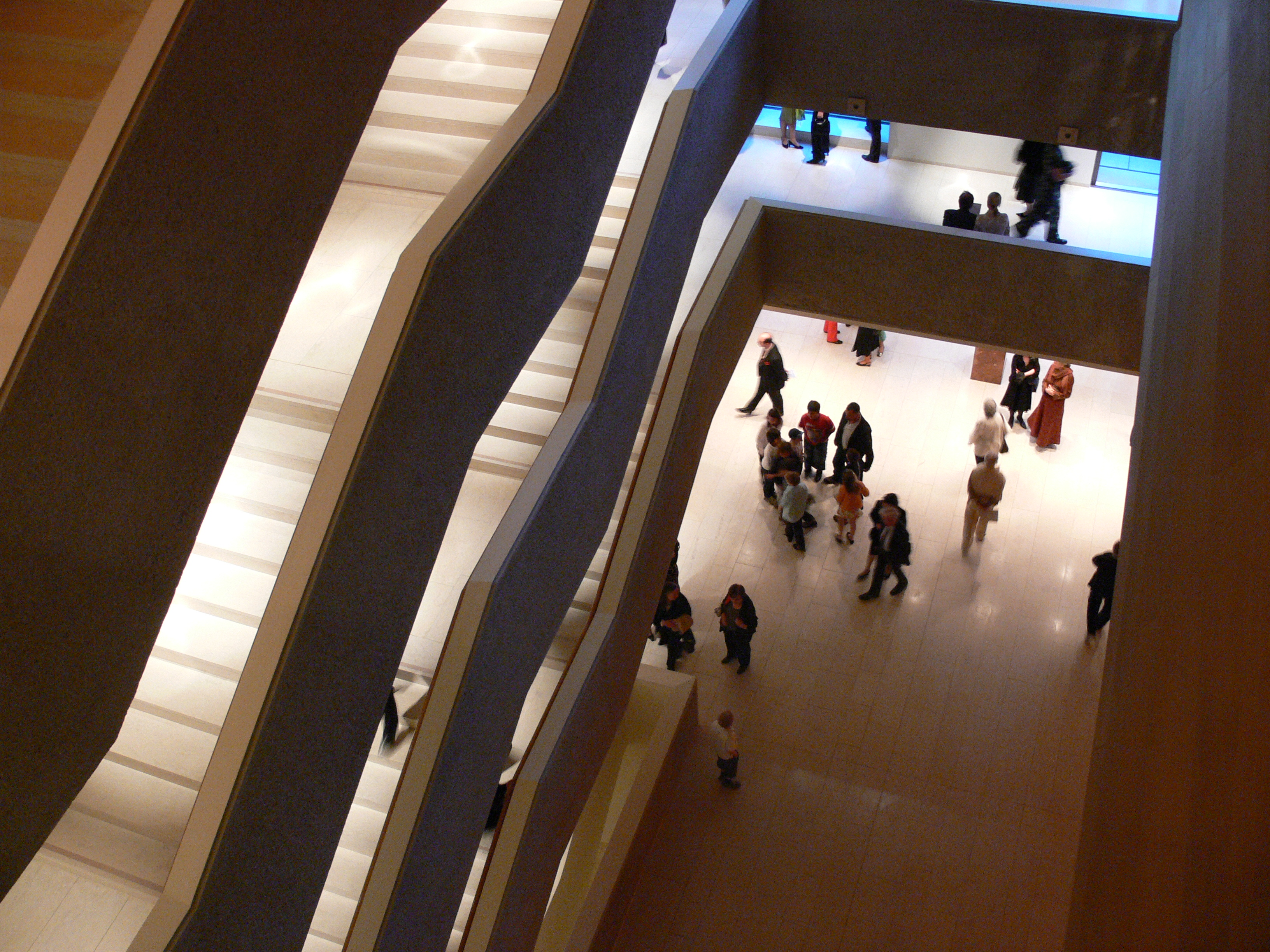 Salzburg, Festspielhauskomplex, Haus für Mozart (Kleines Festspielhaus) Treppenhaus